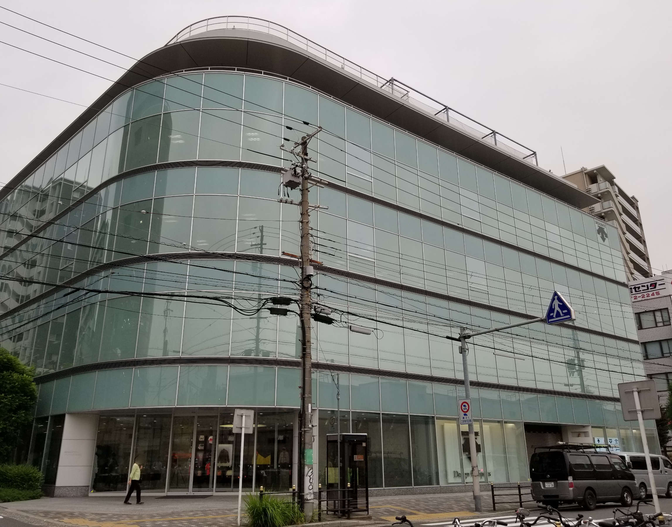 大阪市天王寺区・桃谷駅前のデサント本社ビル。2018年6月8日撮影。